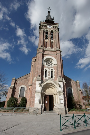 Église de Bondues